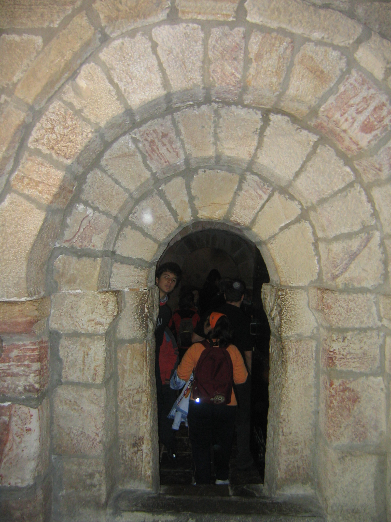 Monasterio de Leyre, puerta de entrada a la cripta, Yesa, Navarra (España).